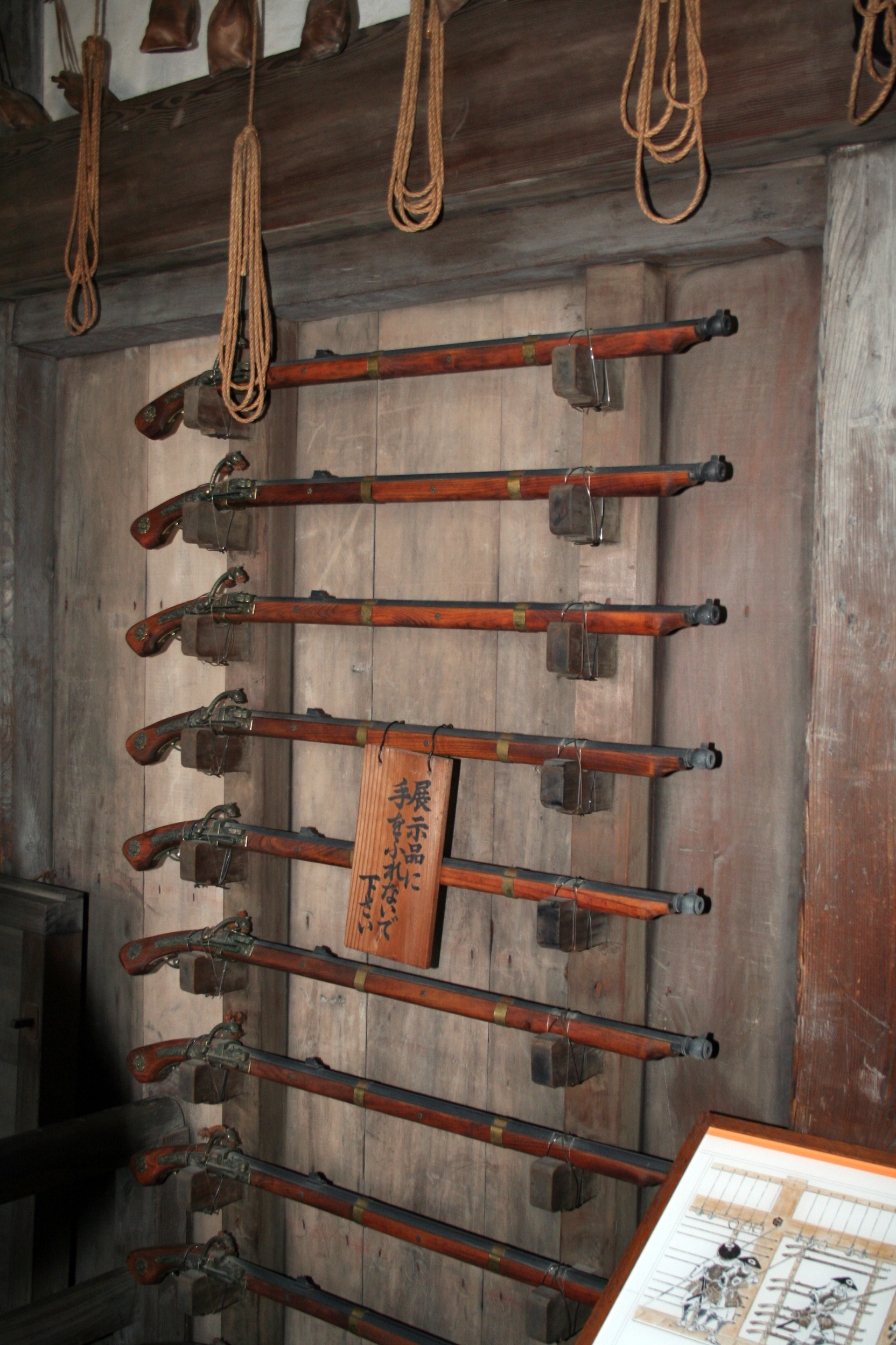 2009年秋の姫路城。 大天守内部に設置されている火縄銃。